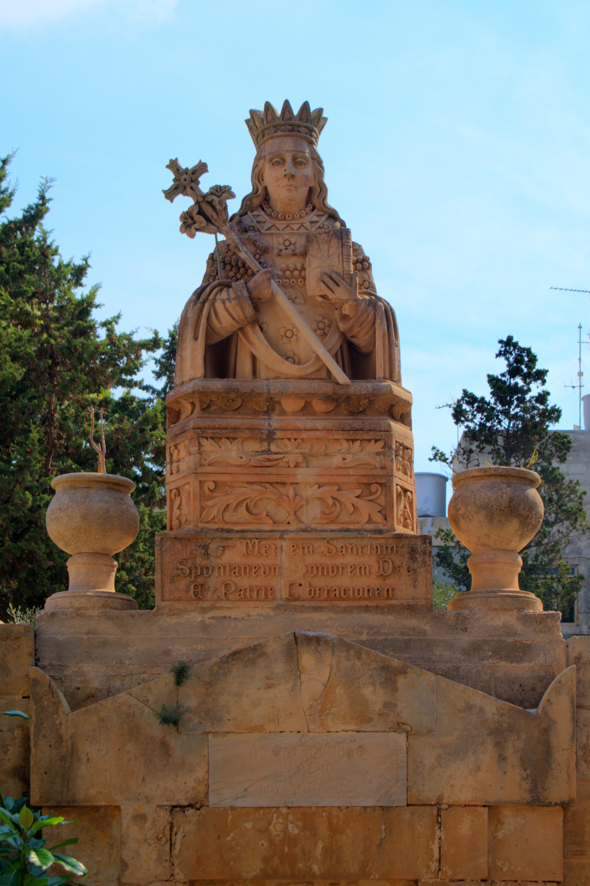 Malta, Rabat, Statue der hl. Agatha bei den gleichnamigen Katakomben. Die lateinische Inschrift lautet Mentem sanctam, spontaneum honorem Deo et patrie liberacionem - "Heilige Gesinnung, freiwillige Ehrerbietung gegen Gott und die Befreiung des Vaterlandes". Sie entstammt der mittelalterlichen Agathalegende (1) und wurde als Abwehrsegen gegen Feuer verwendet (2).